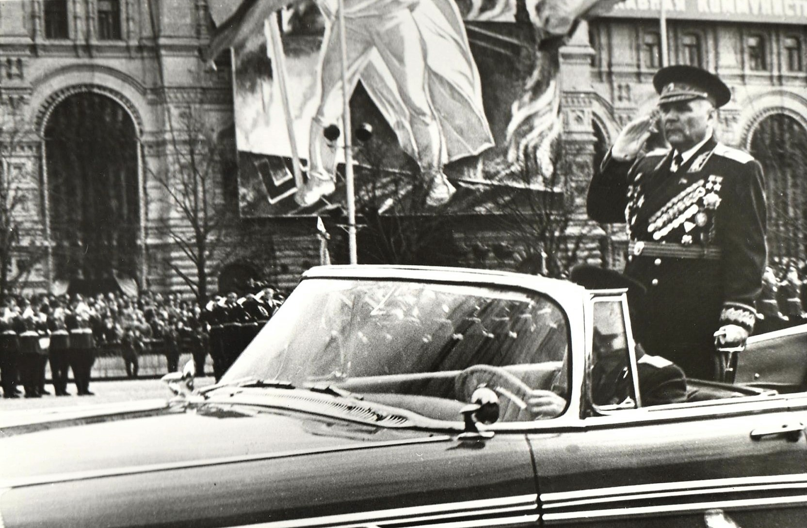 Министр обороны СССР дважды Герой Советского Союза Маршал Советского Союза Р. Я. Малиновский принимает военный парад в честь 20-й годовщины победы советского народа в Великой Отечественной войне